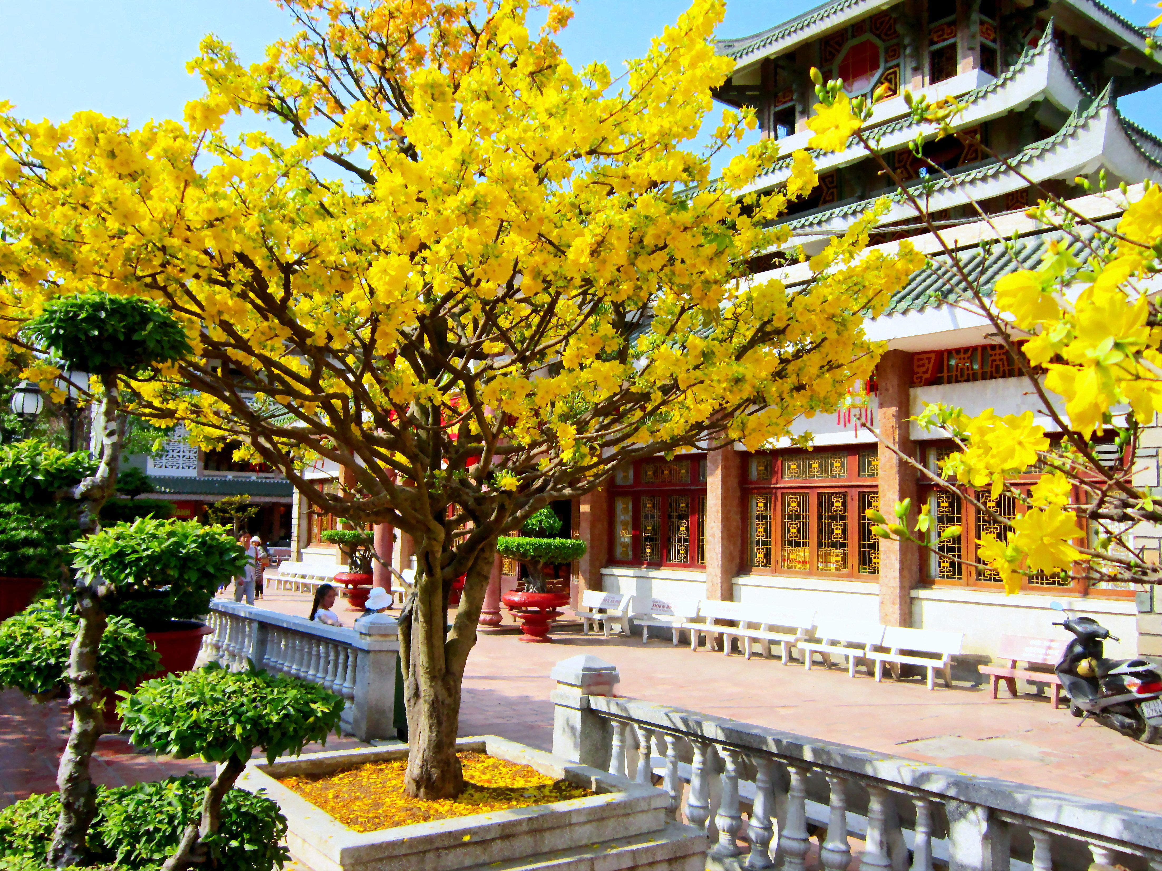 Một cây mai vàng trổ đầy hoa trong khuôn viên miếu Bà Chúa Xứ Núi Sam ở TP. Châu Đốc, An Giang, Việt Nam. Ảnh chụp vào mùng 7 Tết năm Giáp Ngọ (2014).